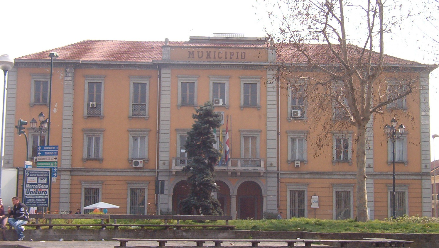 Municipio - Nichelino - provincia di Torino - Italia